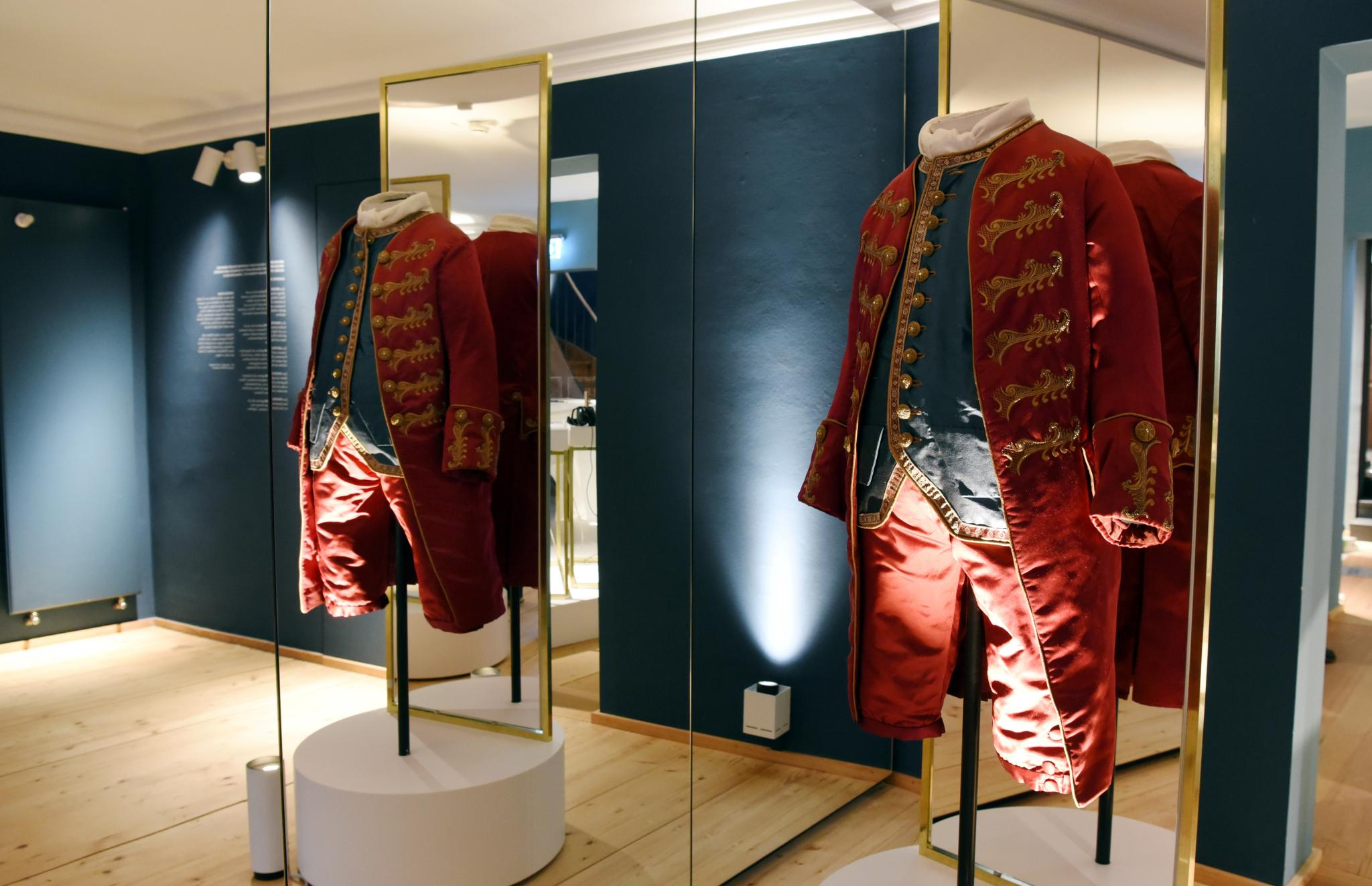 Kleider aus der Zeit Leopold Mozarts